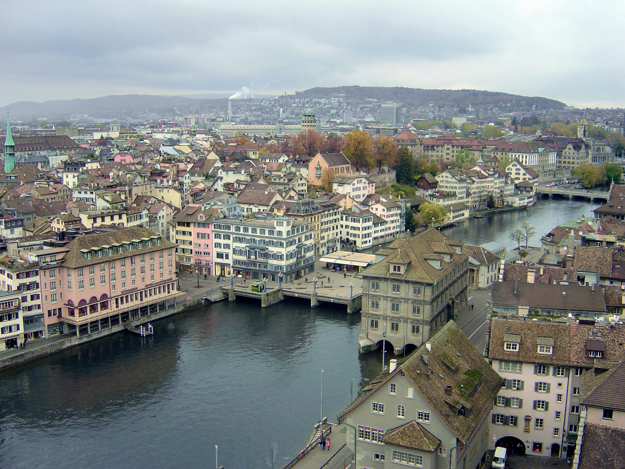 Limmat in der Altstadt von Zrich